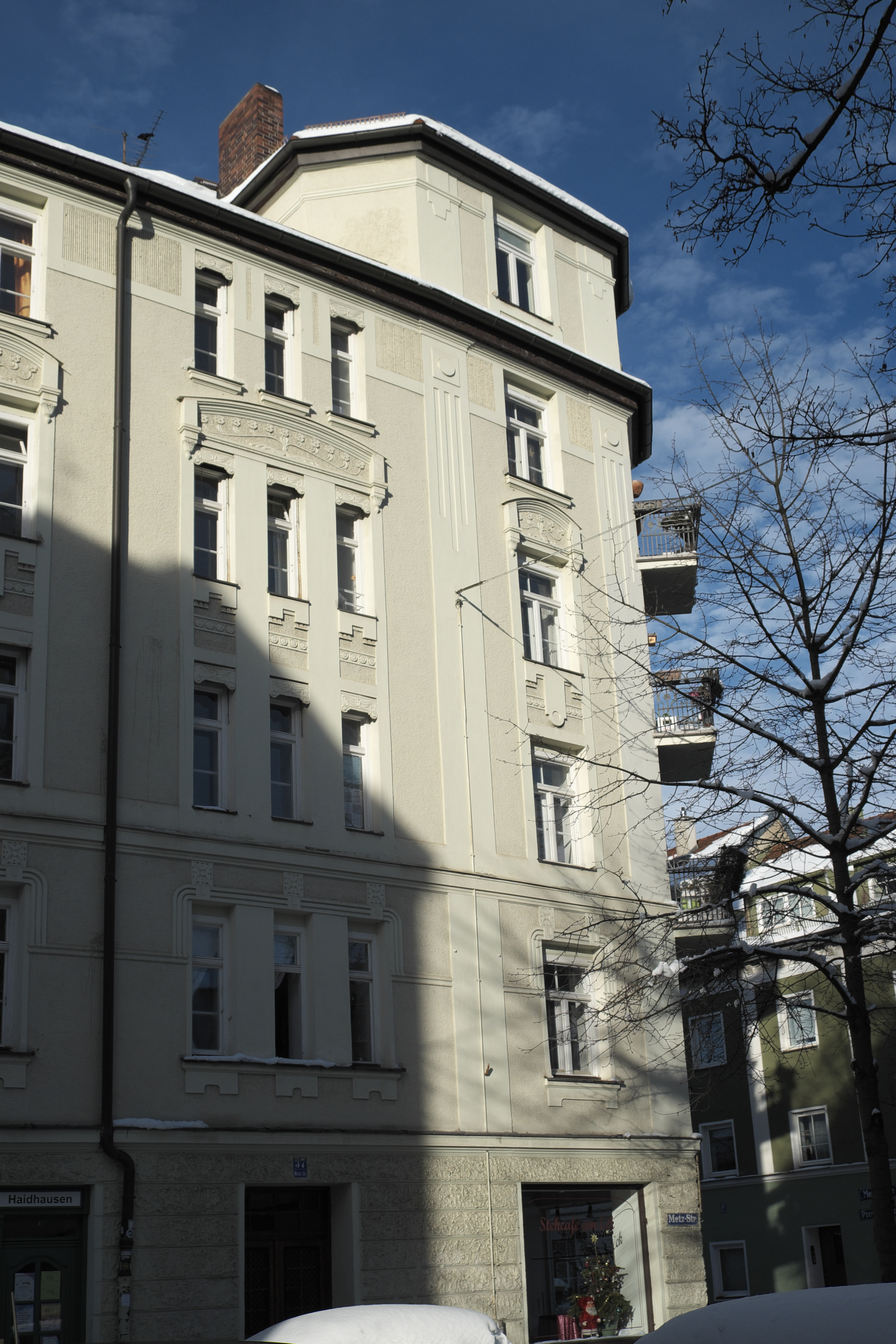 Mietshaus in der Metzstraße 37 in Haidhausen im Stadtbezirk Au-Haidhausen in München (Bayern/Deutschland), Anfang 20. Jahrhundert